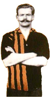 Imagen de Guillermo Davies, histórico capitán del Central Uruguay Railway Cricket Club y autor del primer gol oficial del equipo.